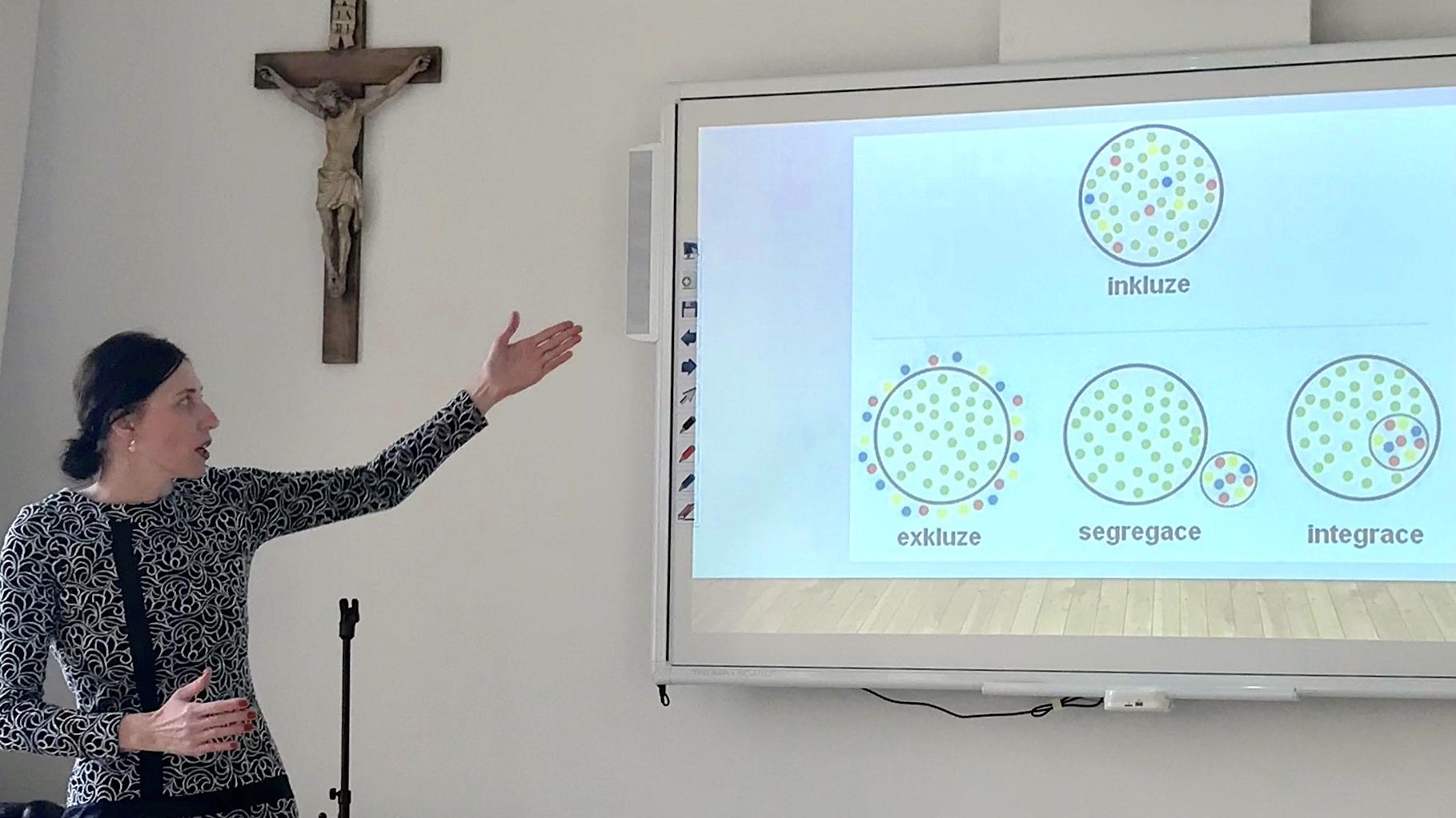 Marie Gottfriedová na setkání pastoračních asistentů v Litoměřicích 22. listopadu 2017 vysvětluje inkluzi.